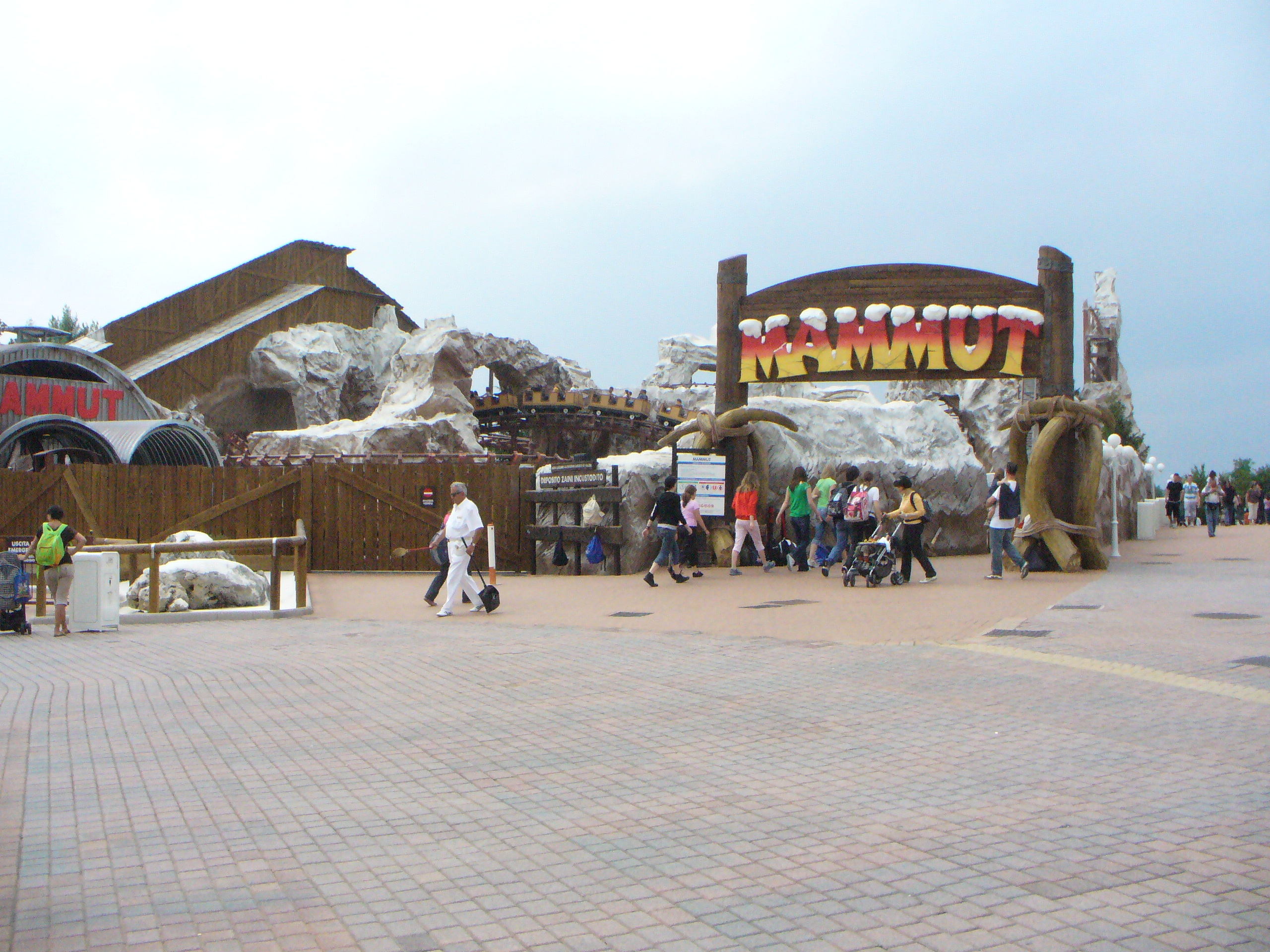 Ingresso dell'attrazione Mammut a Gardaland